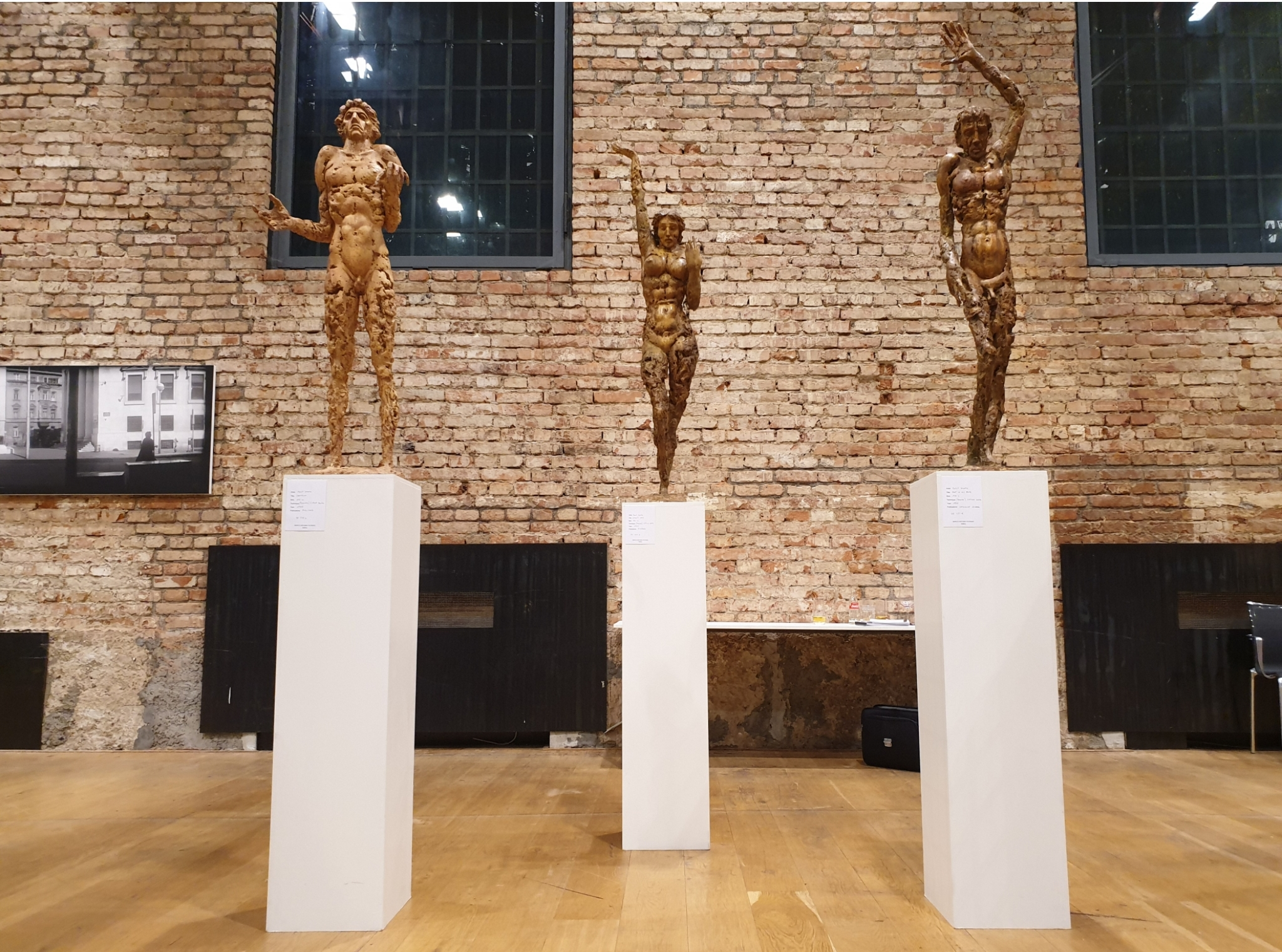 "NESVRSTANI - Boutique Art Fair 2019", Lauba, Zagreb